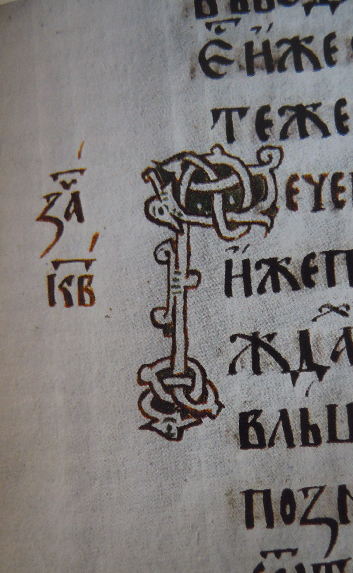 Српски (ћирилица): Витовничко Јеванђеље